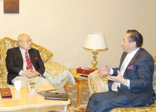 国際的ジャーナリスト著名評論家の阮次山先生と現代医科学について対談している戴峰